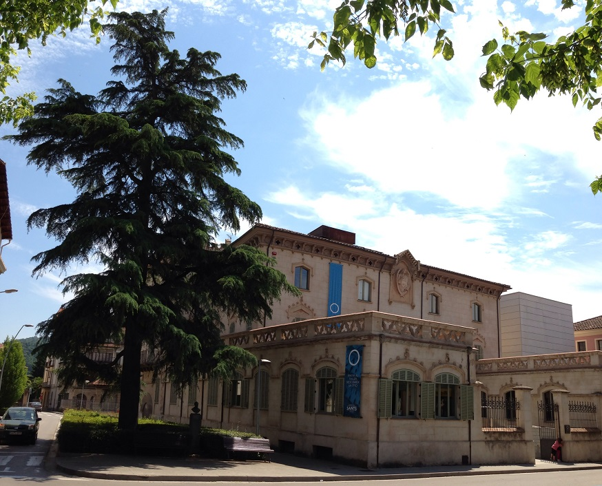 Museu dels Sants d'Olot. Vista general des de l'exterior.